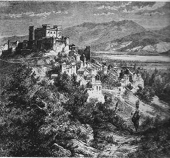 Veduta di Celano con il Lago del Fucino a metà dell'800 di K.Stieler, E.Paulus, W.Kaden, Dalle Alpi all'Etna, 1878.